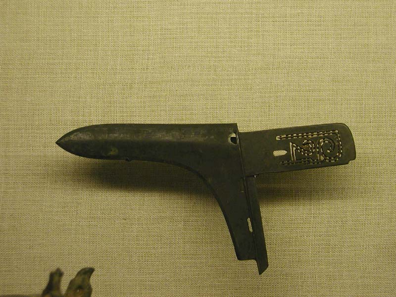 戈，中国古代青铜兵器。本文物藏于北京大学赛克勒考古与艺术博物馆，为战国时期的兵器。 User:Mountain2004年7月28日拍摄于北京大学赛克勒考古与艺术博物馆。拍摄者已授权依照GFDL协议发布该图像。